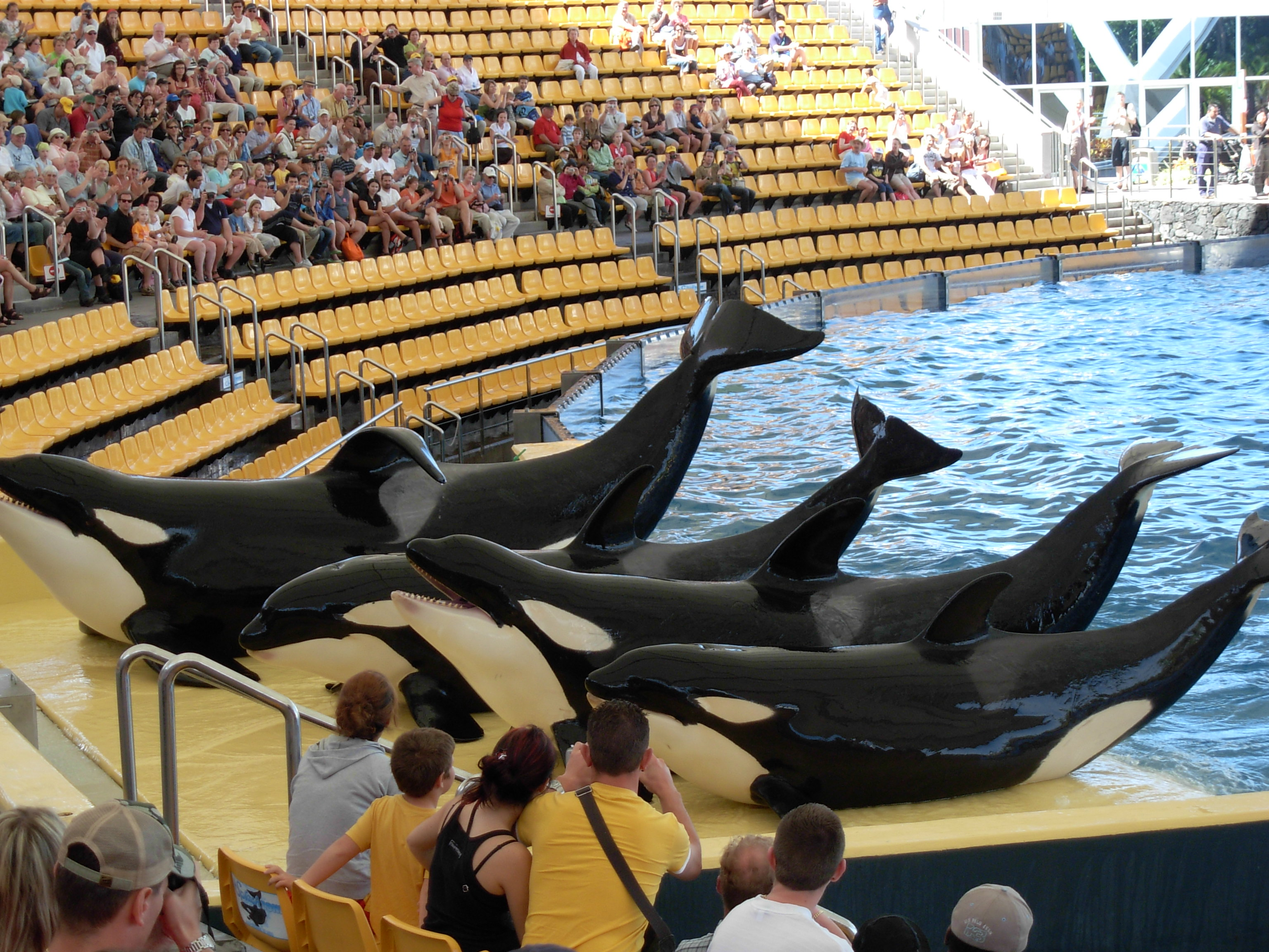 Orcas at Loro Parque.